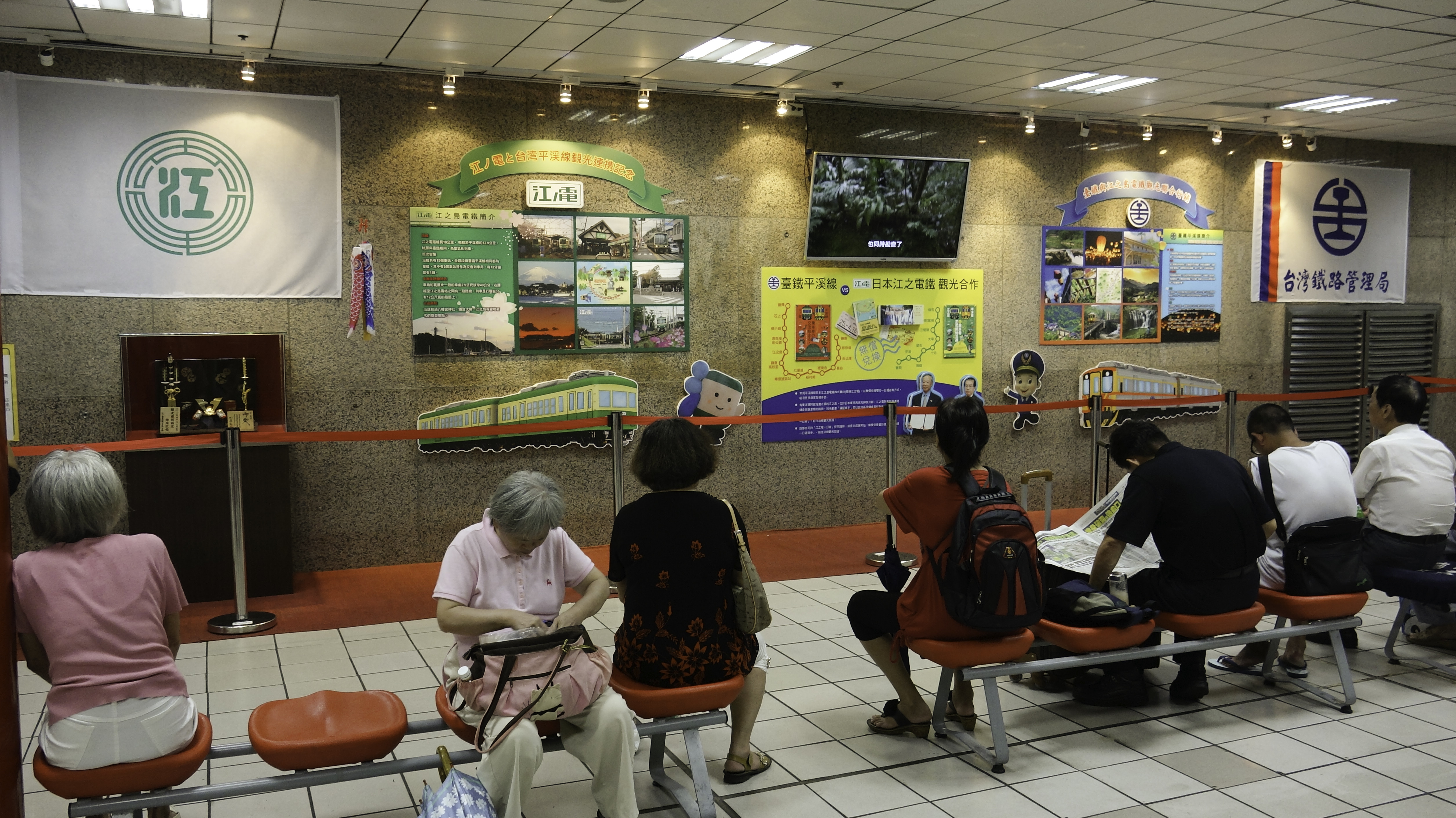 江ノ電と台鉄平渓線との共同送客についての展示（台北駅コンコース）